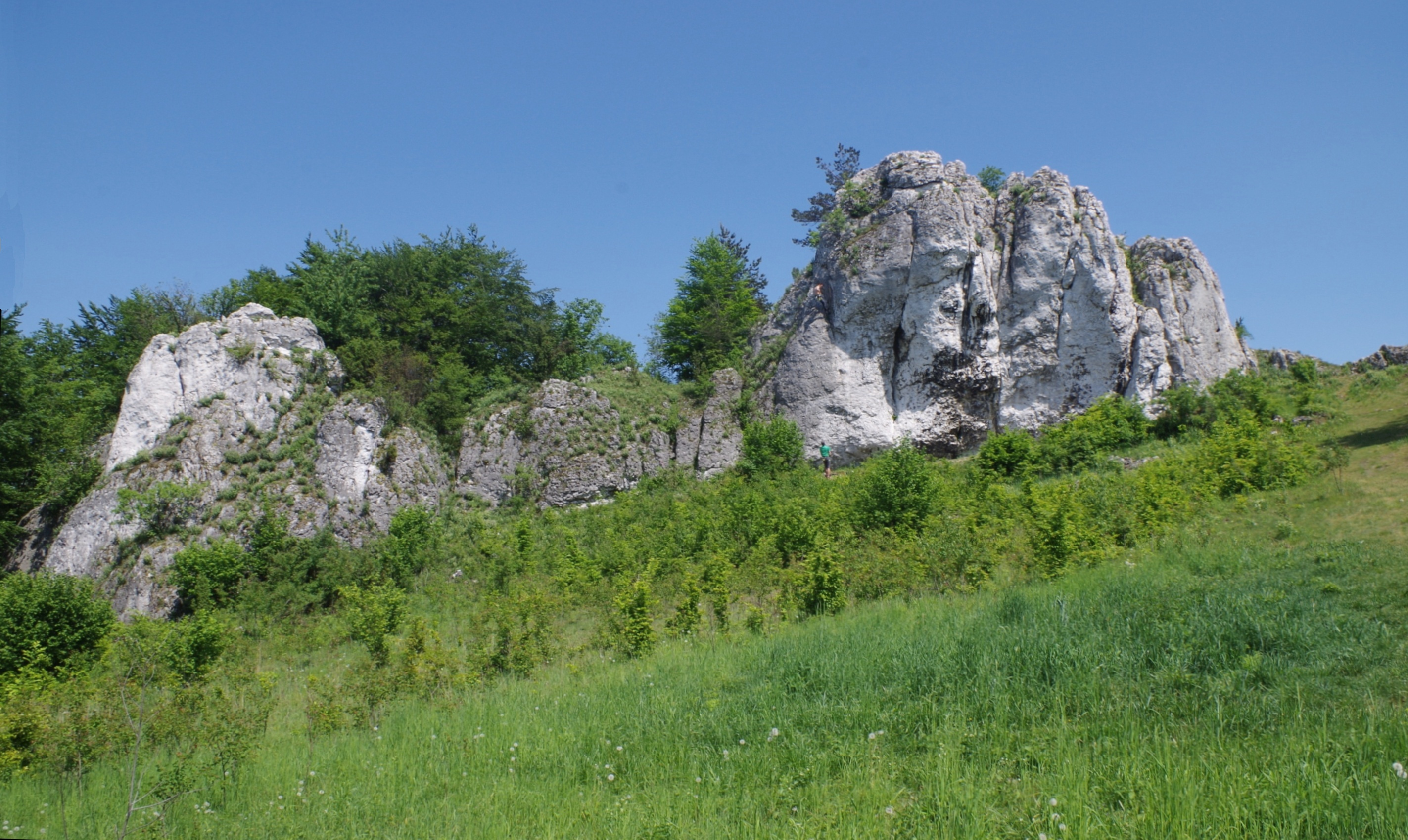 Skały Tapir i Nosorożec w grupie Wielki Grochowiec w Ryczowie